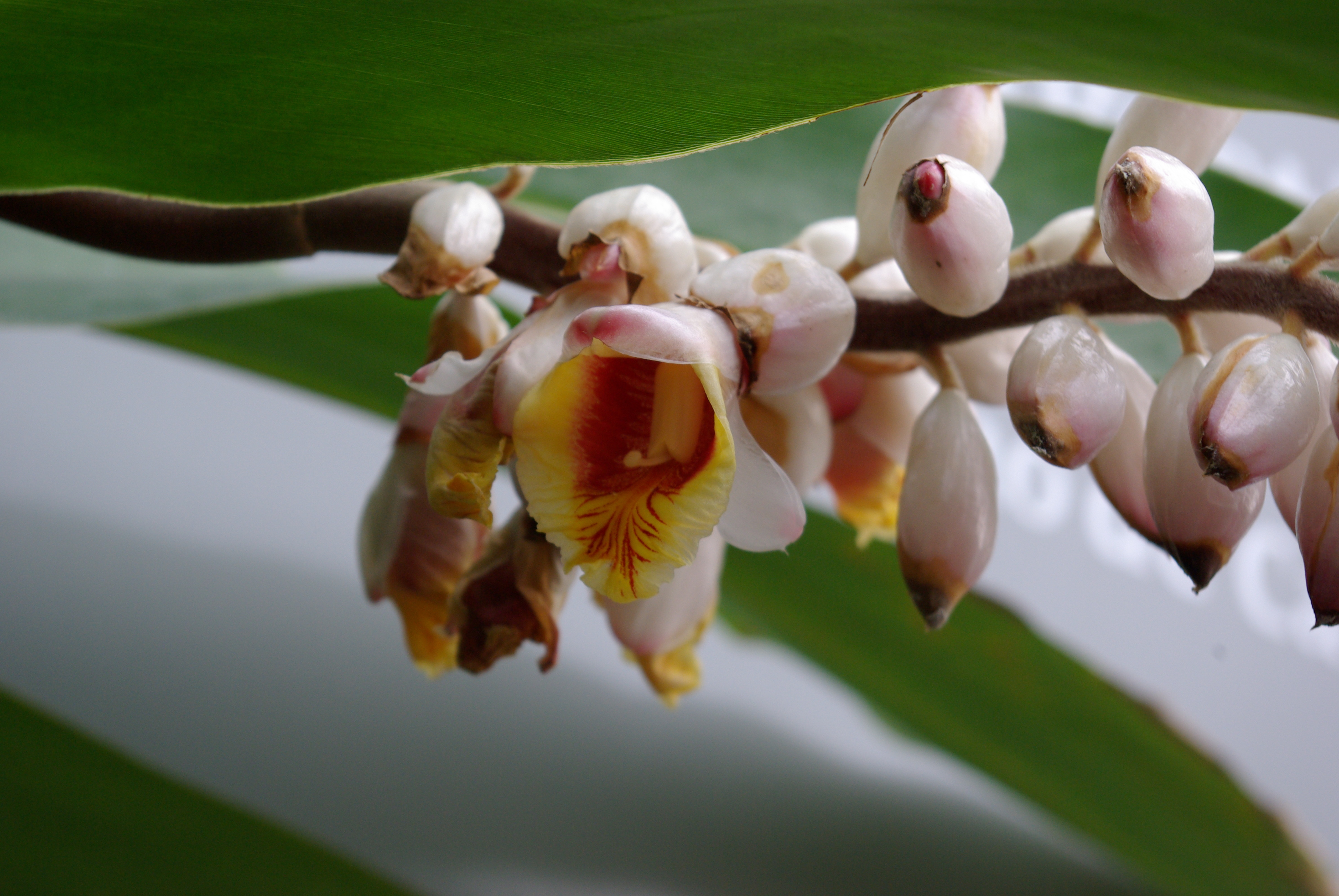 Alpinia zerumbet im Botanischen Garten von Puerto de la Cruz, Teneriffa